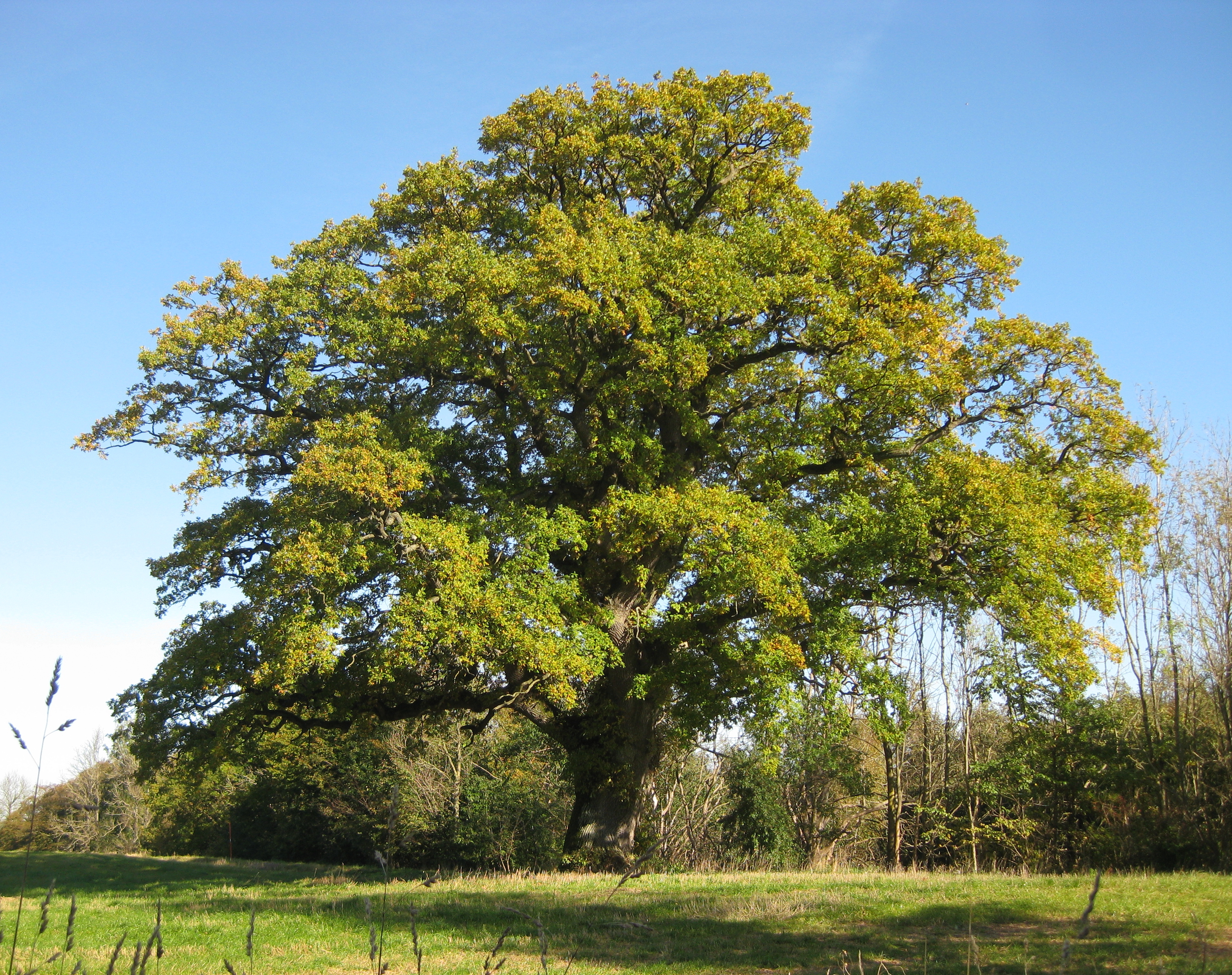 Gammal ek vid Svaneholm i Skåne